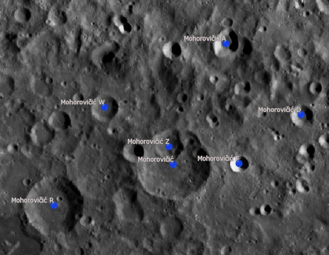 Cráter lunar Mohorovičić. Cráteres satélite. (Imagen LRO)